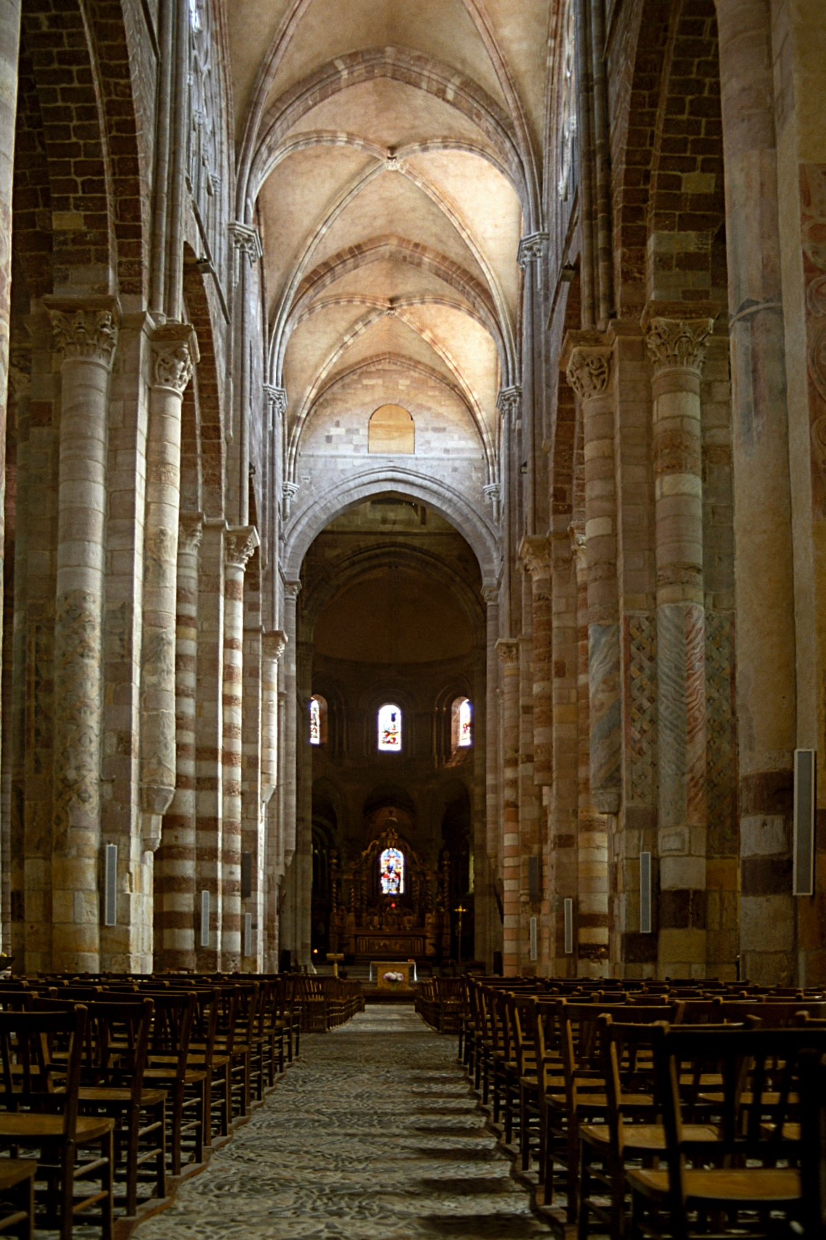 France - Auvergne - Basilique Saint-Julien de Brioude